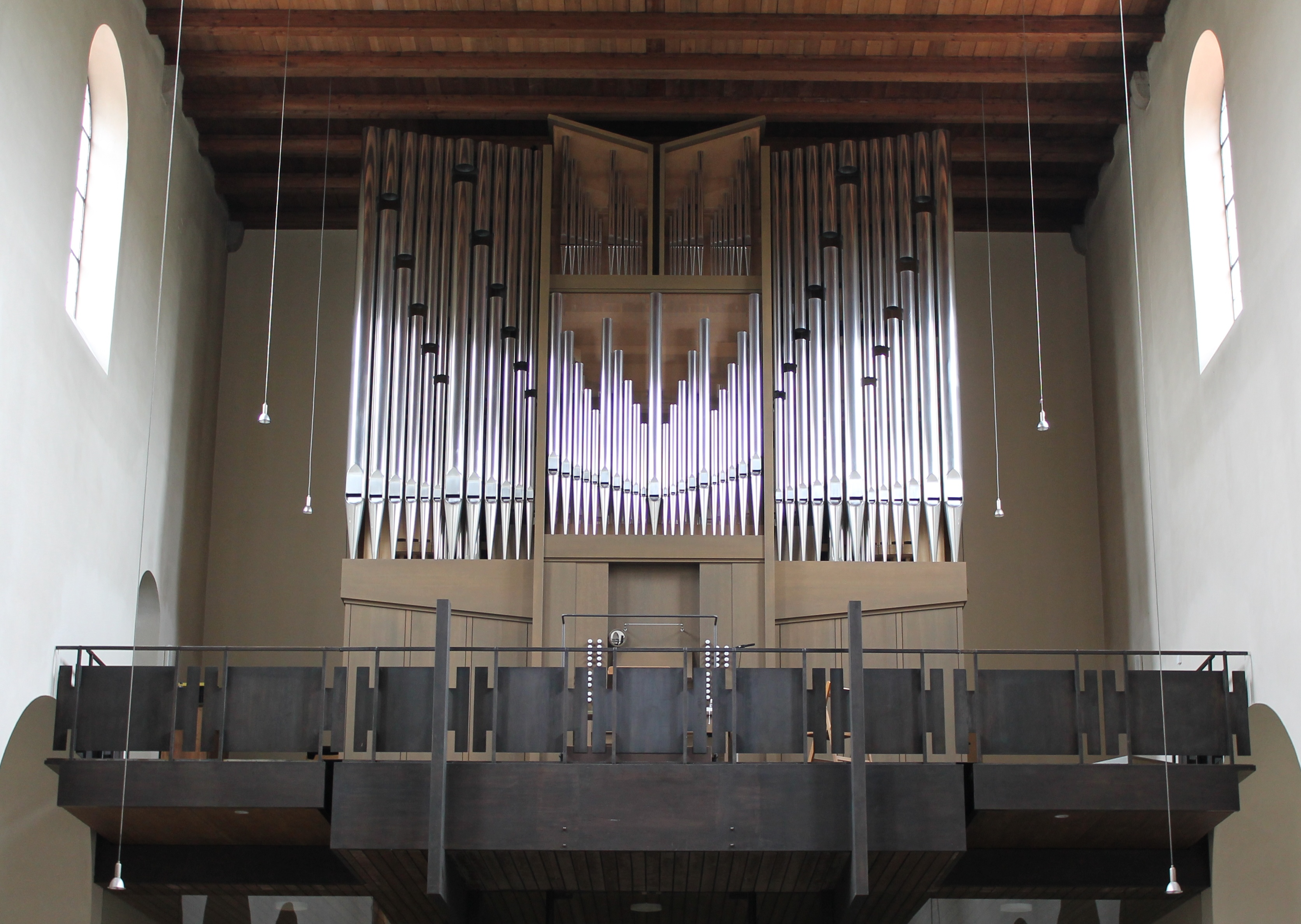 Die Goll-Orgel von St. Martin in München-Moosach (2015, Goll, III/40)